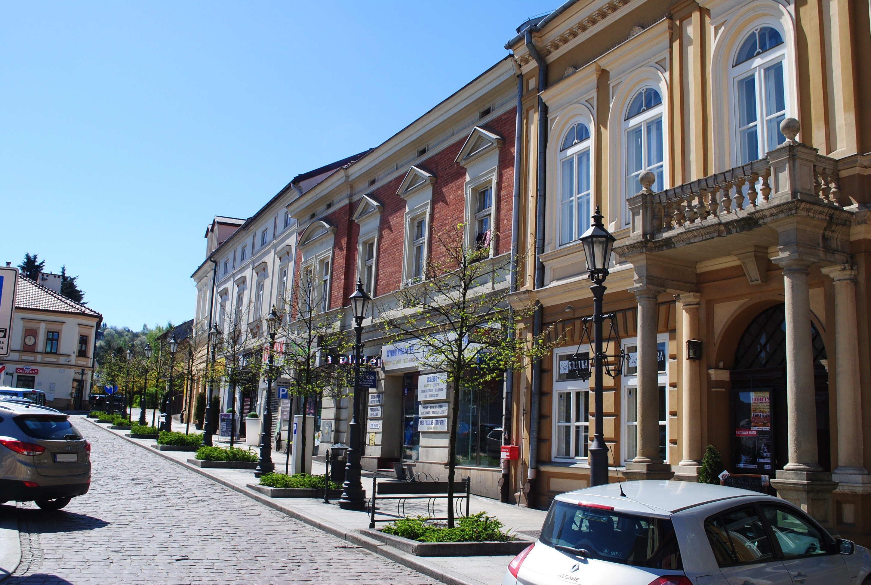 Wieliczka. Rynek